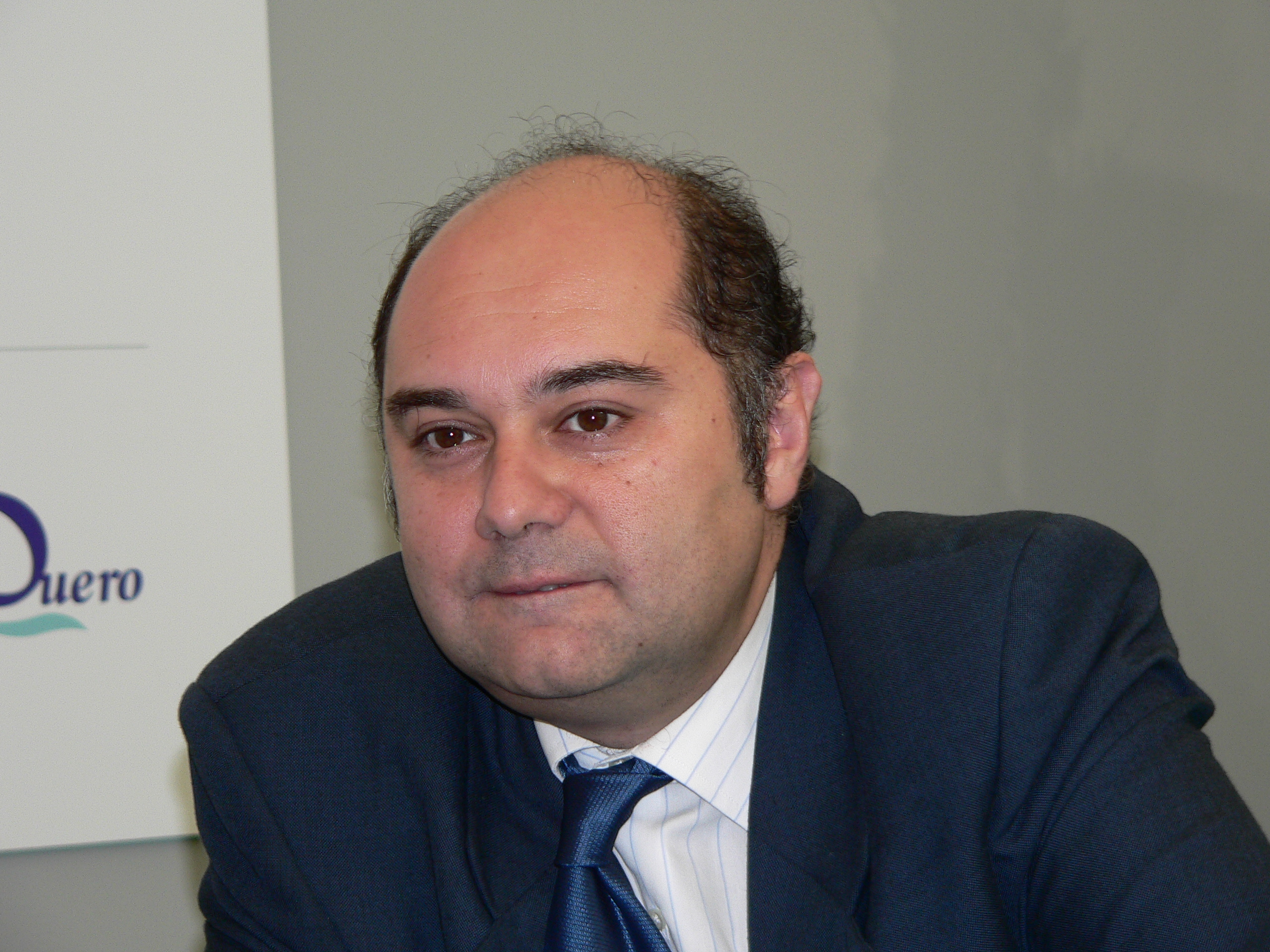 cc-by-3.0